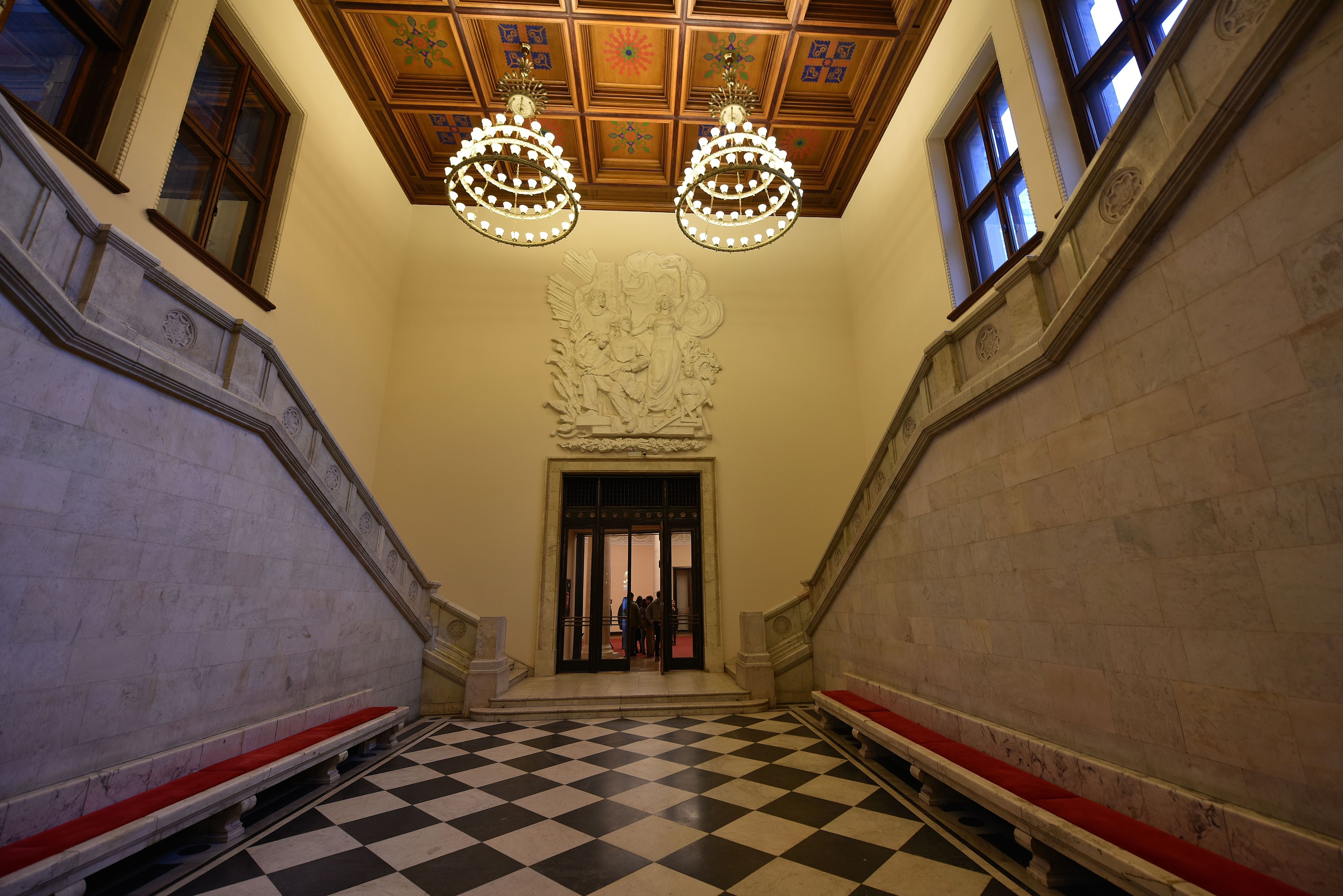 Klatka schodowa w Pałacu Kultury i Nauki. Nad wejściem do Sali Mikołaja Kopernika widoczna płaskorzeźba Georgija Motowiłowa Pokój socjalistyczny niosący ludzkości wiedzę i kulturę